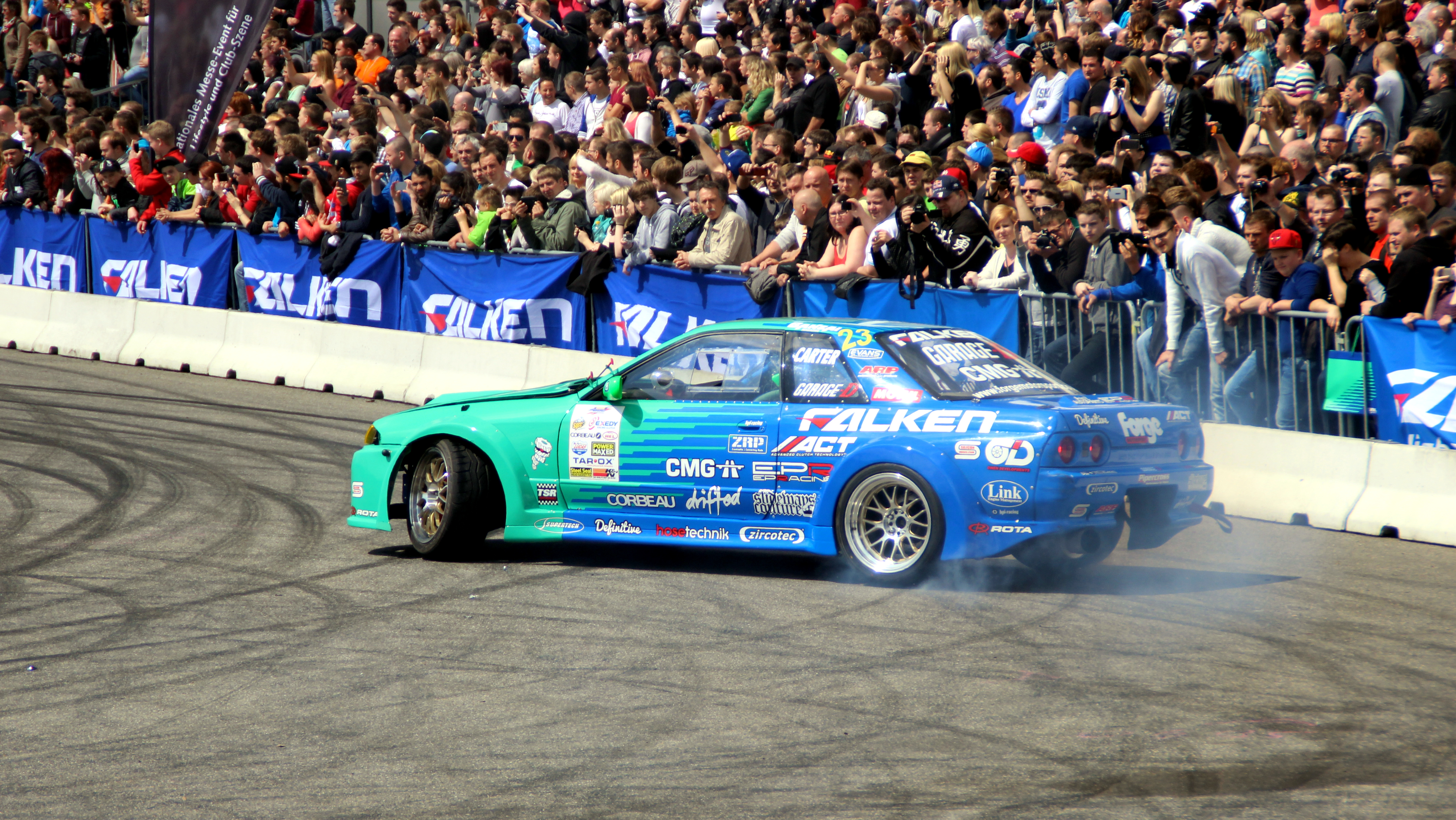 Driftshow während der Tuning World Bodensee 2014